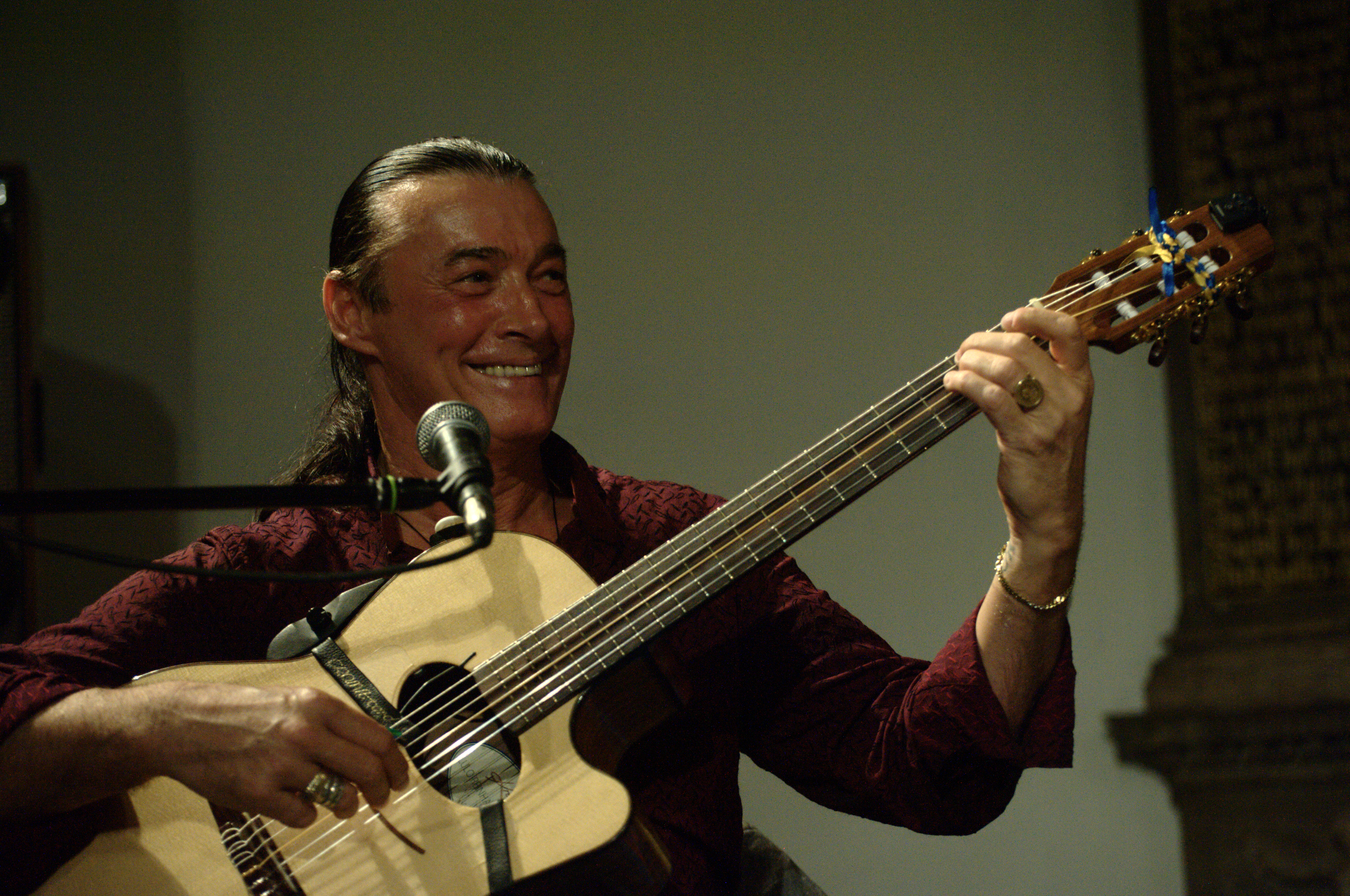 Lulo Reinhardt bei einem Konzert mit Yulyia Lonskaya in der Stadtkirche Darmstadt am 2. Oktober 2017